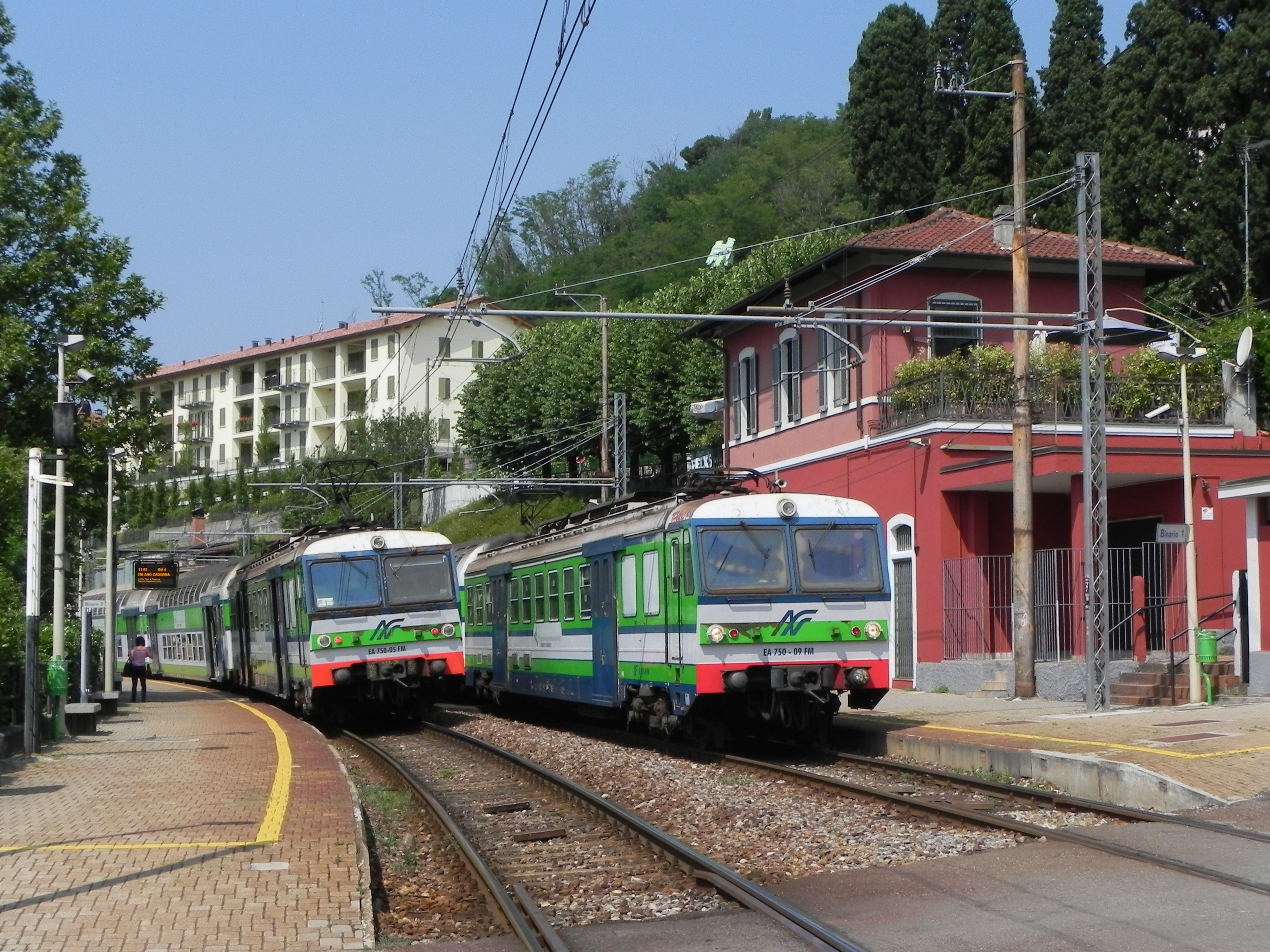 Stazione di Inverigo FNM, incrocio fra due elettromotrici EA.750 di prima serie.